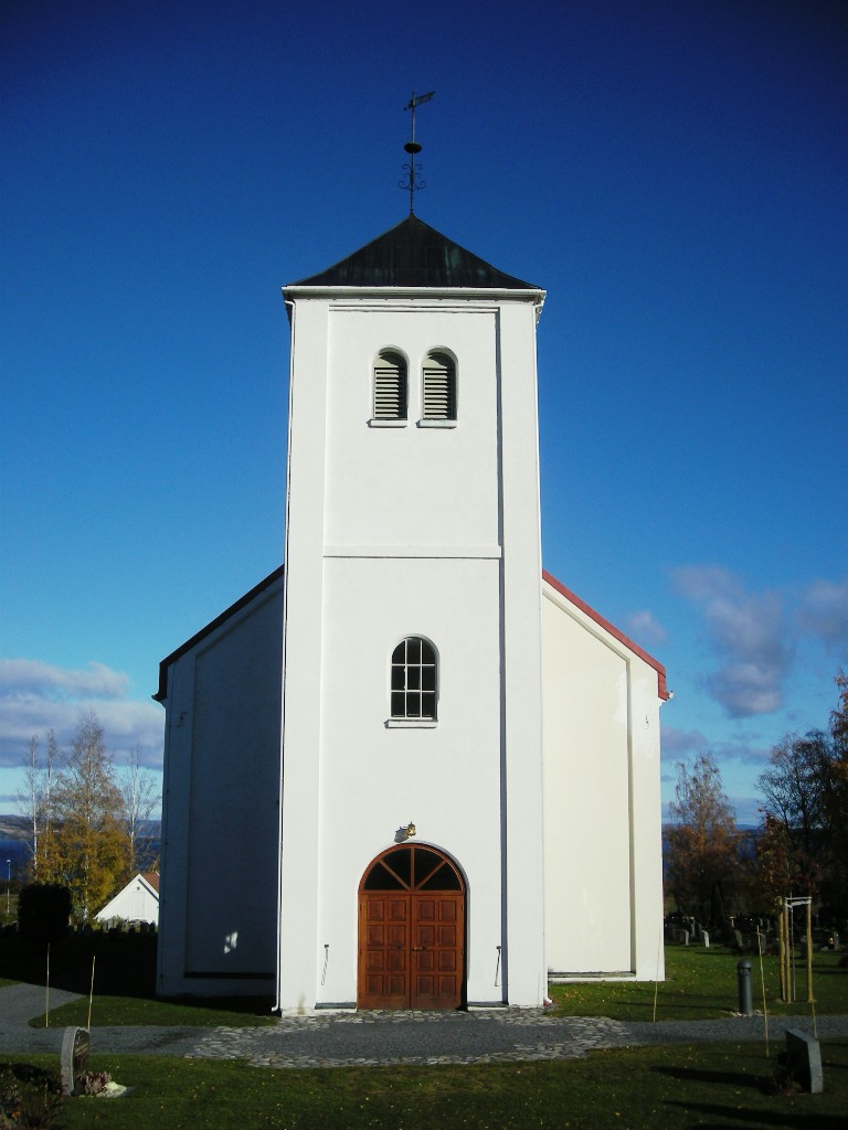 Totenviken kirke, Østre Toten